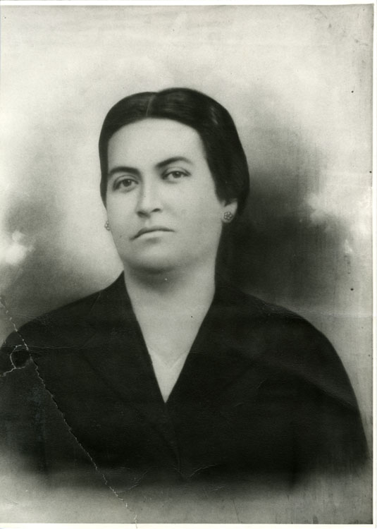 Gabriela Mistral.